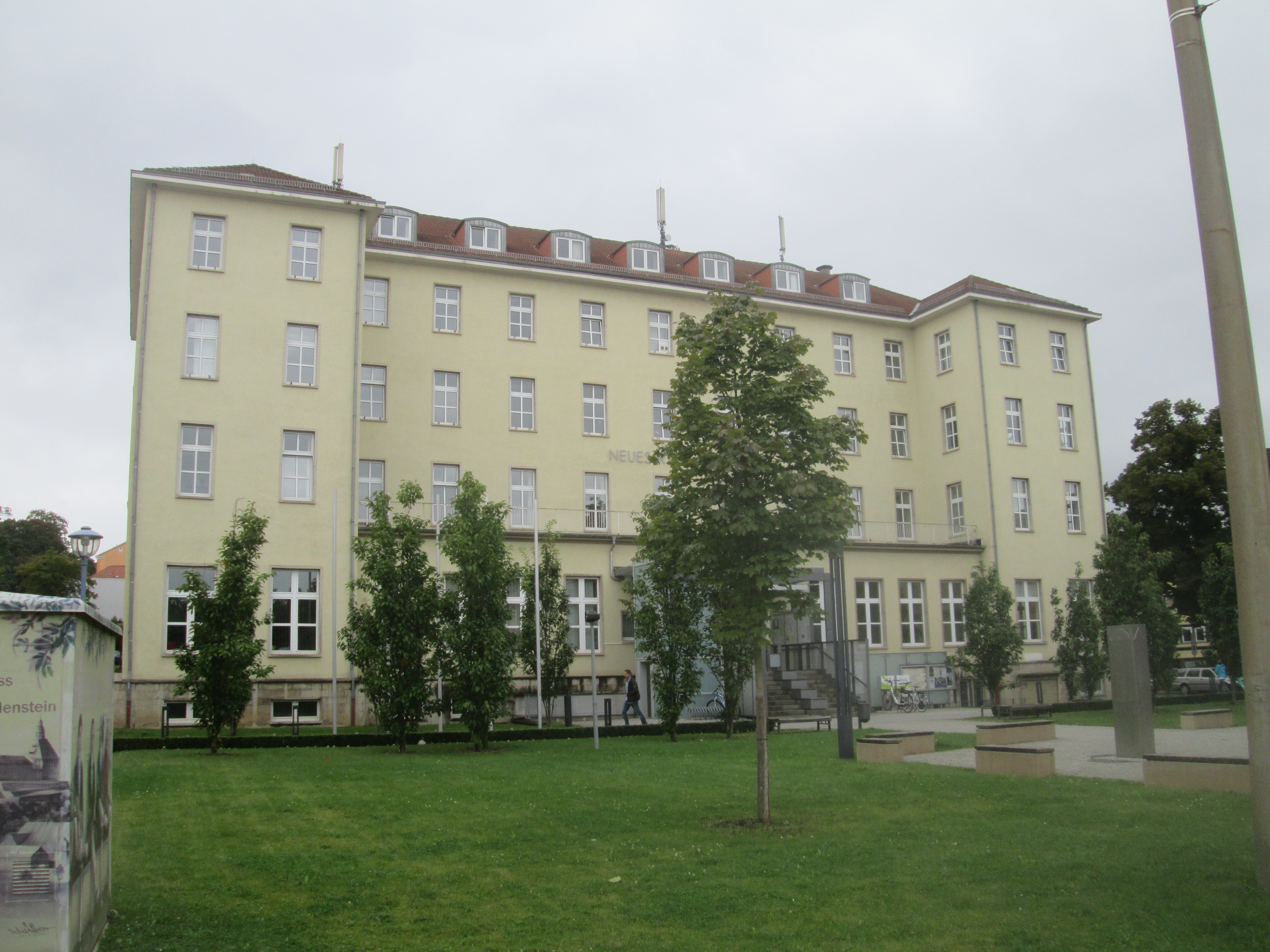 Neues Rathaus Gotha, Eckhofplatz 24